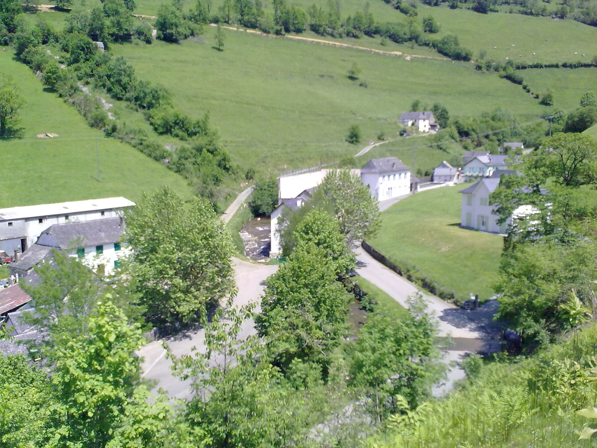 Lourdios-Ichère, France, le 23 mai 2010.